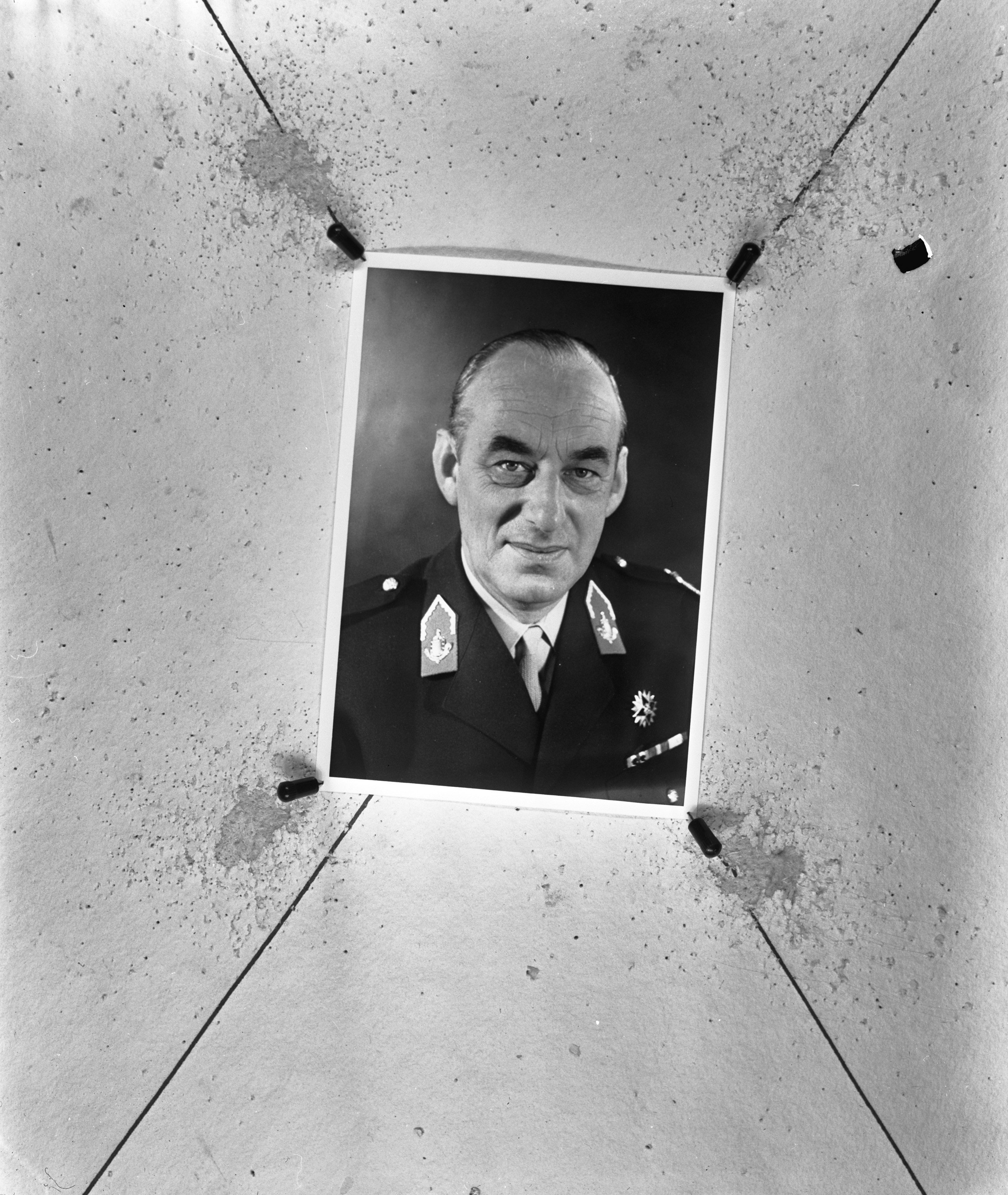 Collectie / Archief : Fotocollectie Anefo Reportage / Serie : [ onbekend ] Beschrijving : Generaal J. E. van der Slikke, de Bevelhebber der Landstrijdkachten Datum : 5 december 1973 Trefwoorden : bevelhebbers, generaals, portretten Fotograaf : Legervoorlichtingsdienst Auteursrechthebbende : Nationaal Archief Materiaalsoort : Negatief (zwart/wit) Nummer archiefinventaris : bekijk toegang 2.24.01.04 Bestanddeelnummer : 926-8709